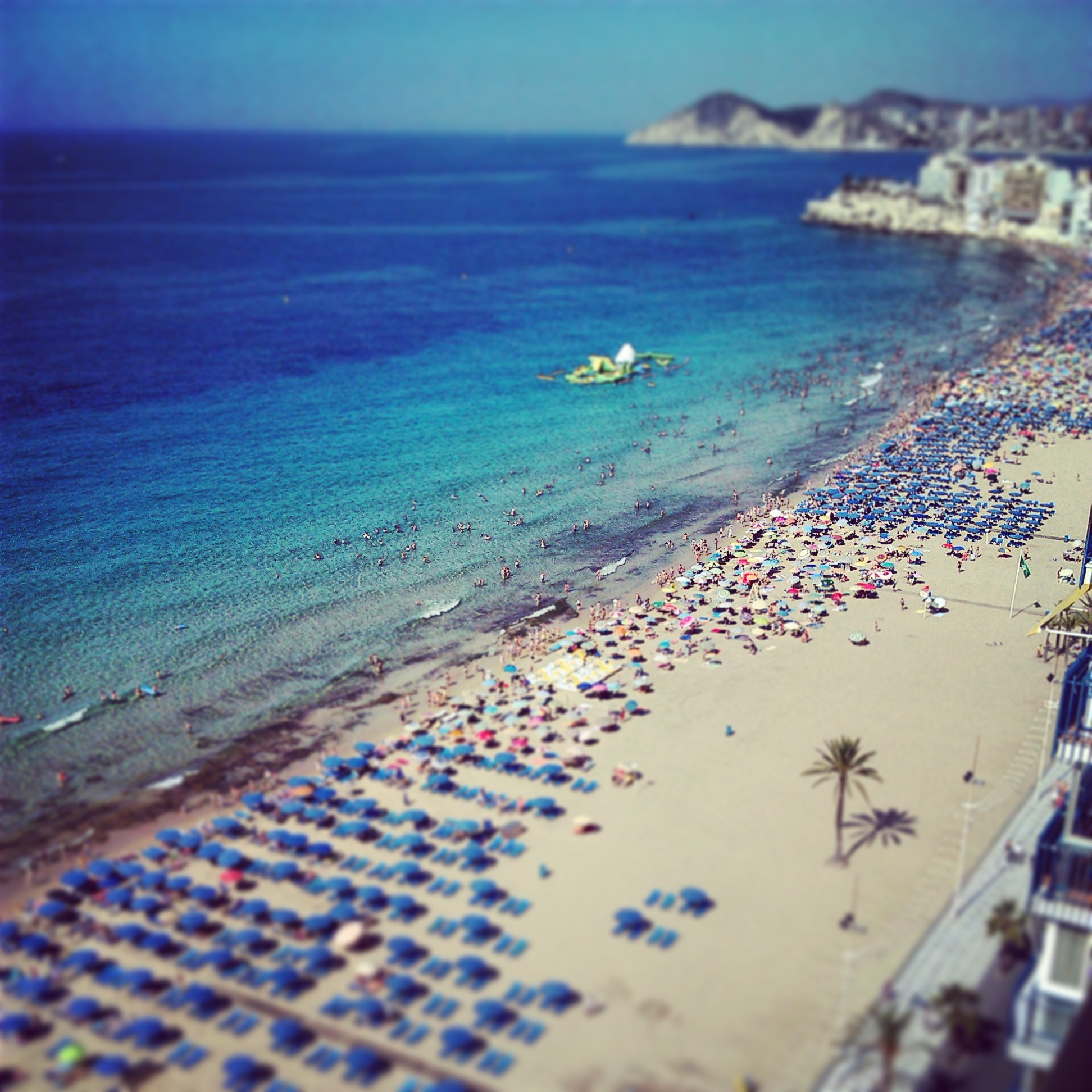 Visió des d'altura de la platja de Llevant — Costa Blanca.